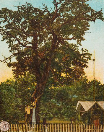 Таковский дуб. 1902 (?)